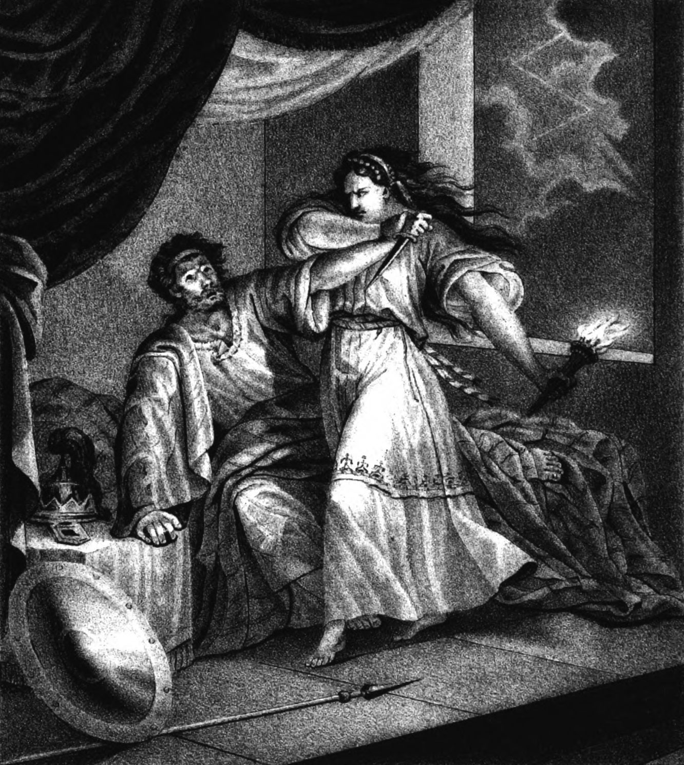 Беларуская (тарашкевіца): Замах Рагнеды на Ўладзімера